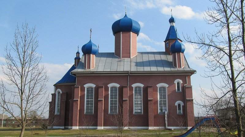 Мікашэвічы. Царква Раства Іаана Прадцечы